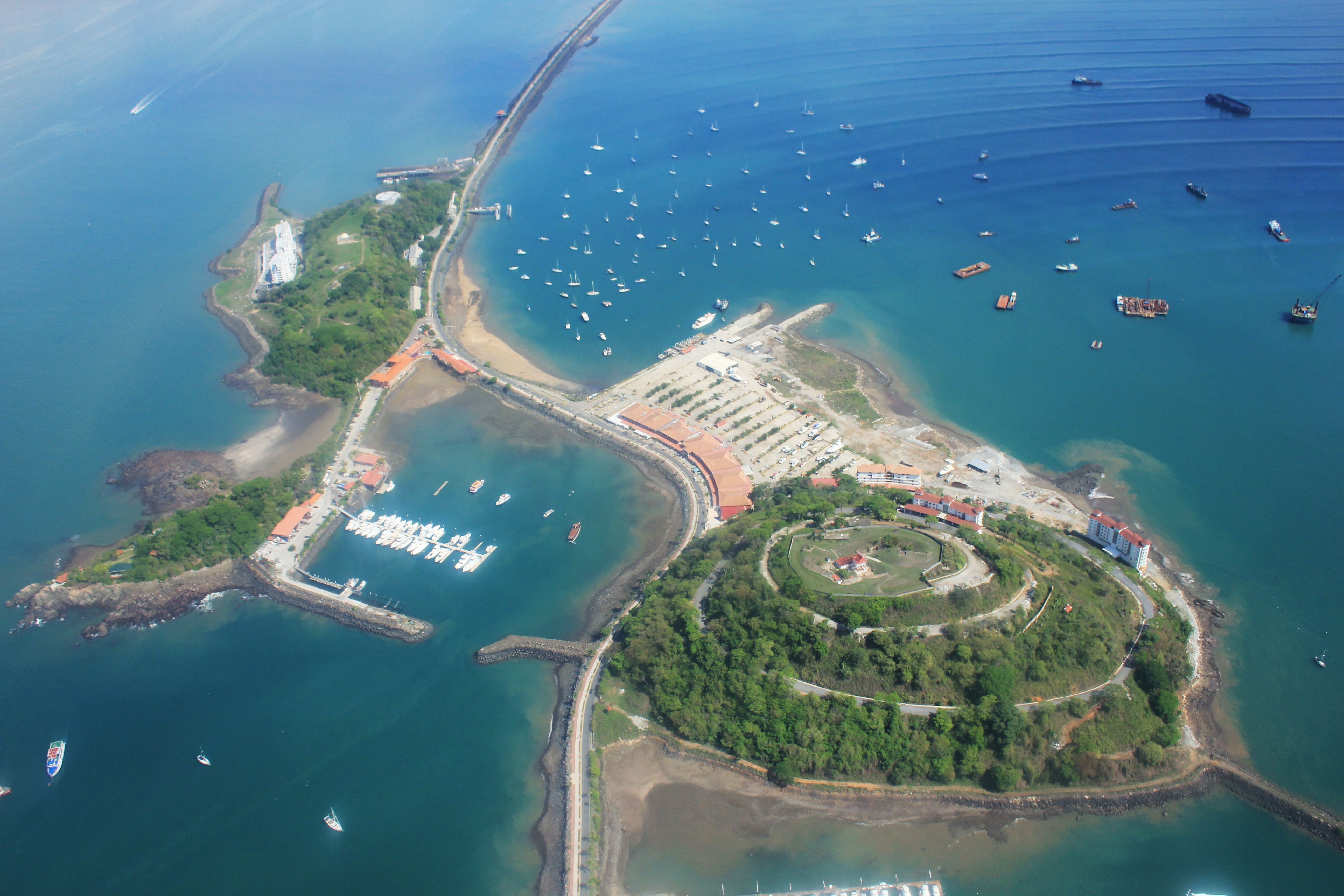 Isla Perico e Isla Naos, en la Calzada de Amador, Ciudad de PanamáUnknown